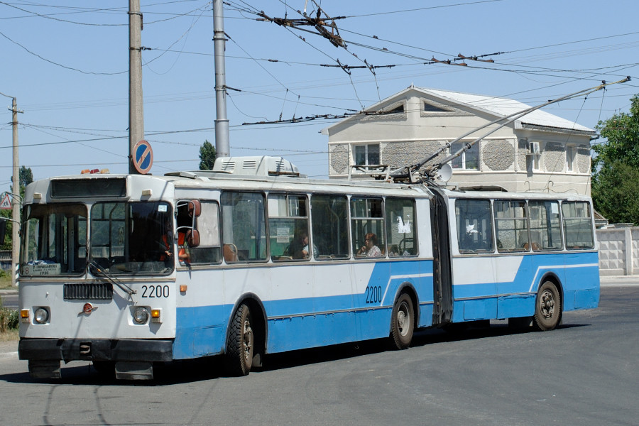 ZiU-10 2200 in Simferopol